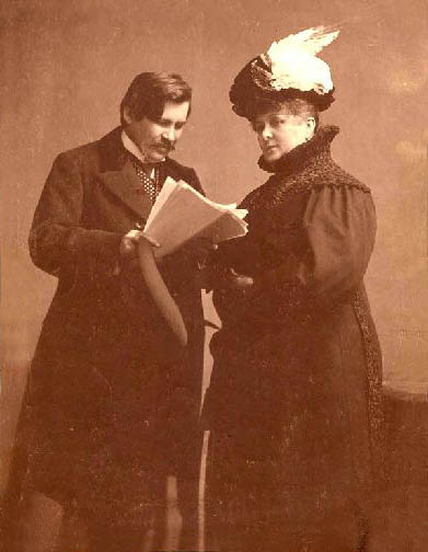 Móricz Zsigmond olvassa Blaha Lujzának a Sári bírót